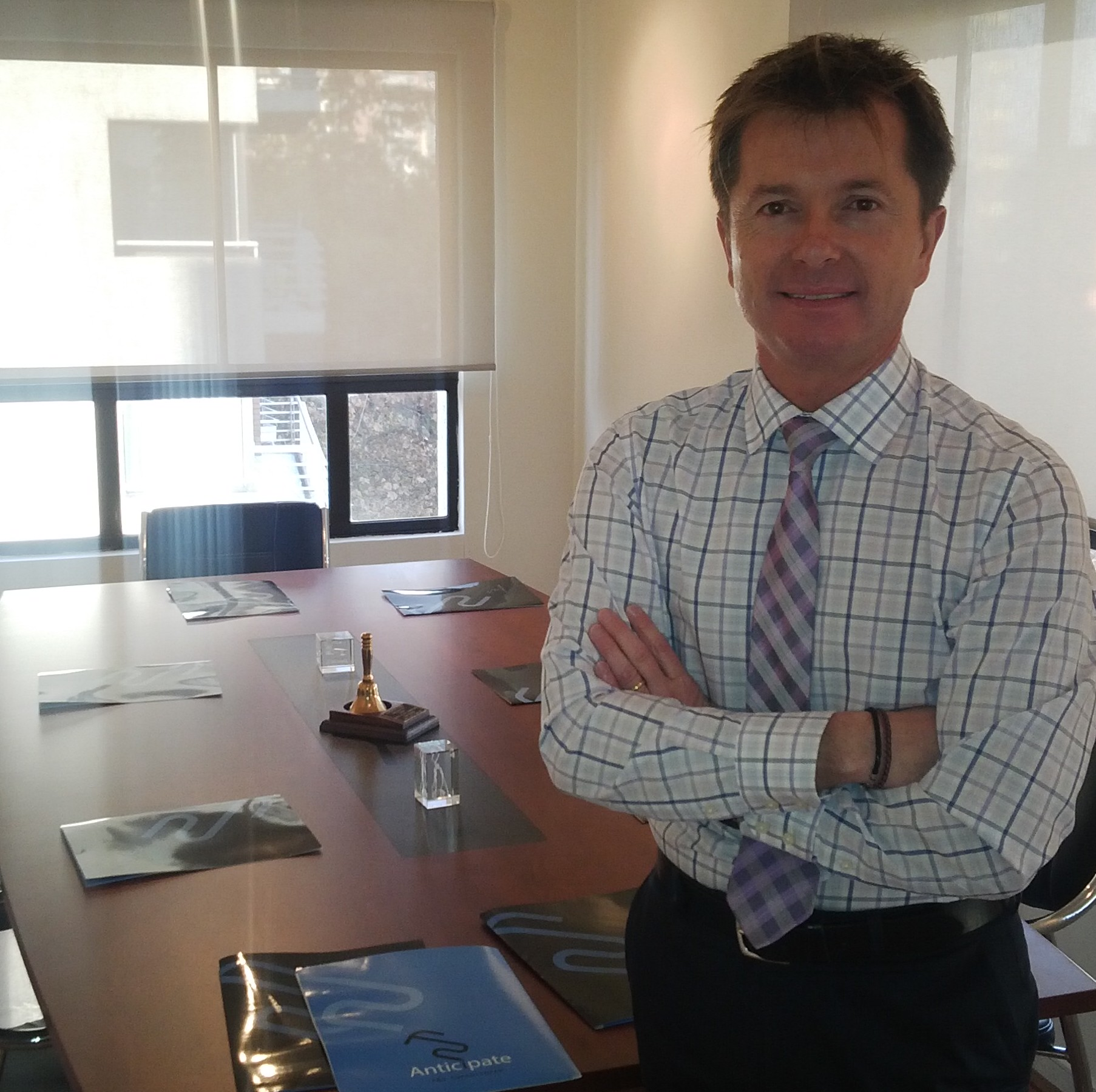 Socio Director